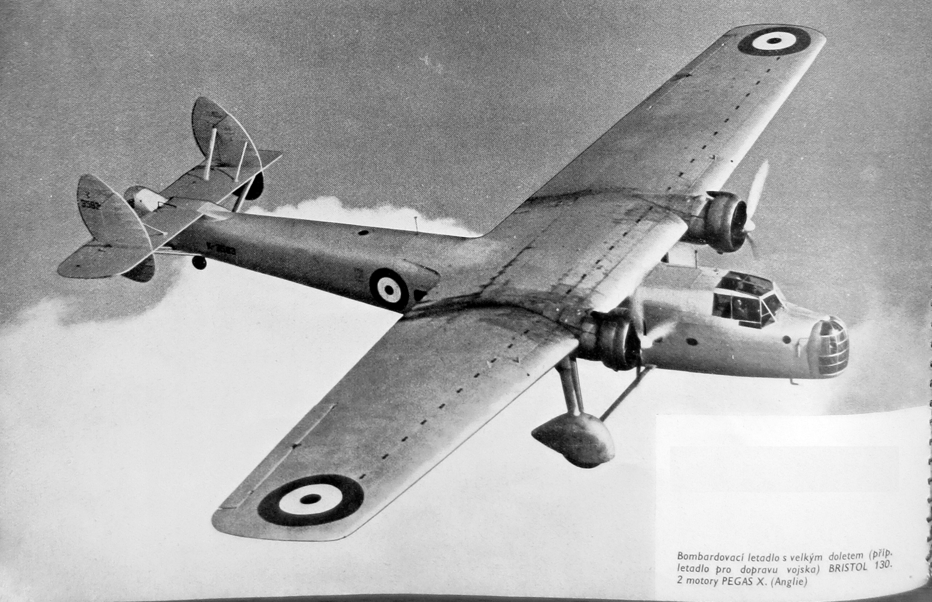 Bristol 130 (motor Pegas X.)